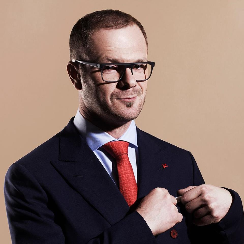 Влад Фісун, ведучий шоу "Великий Фісун" на радіо Аристократи